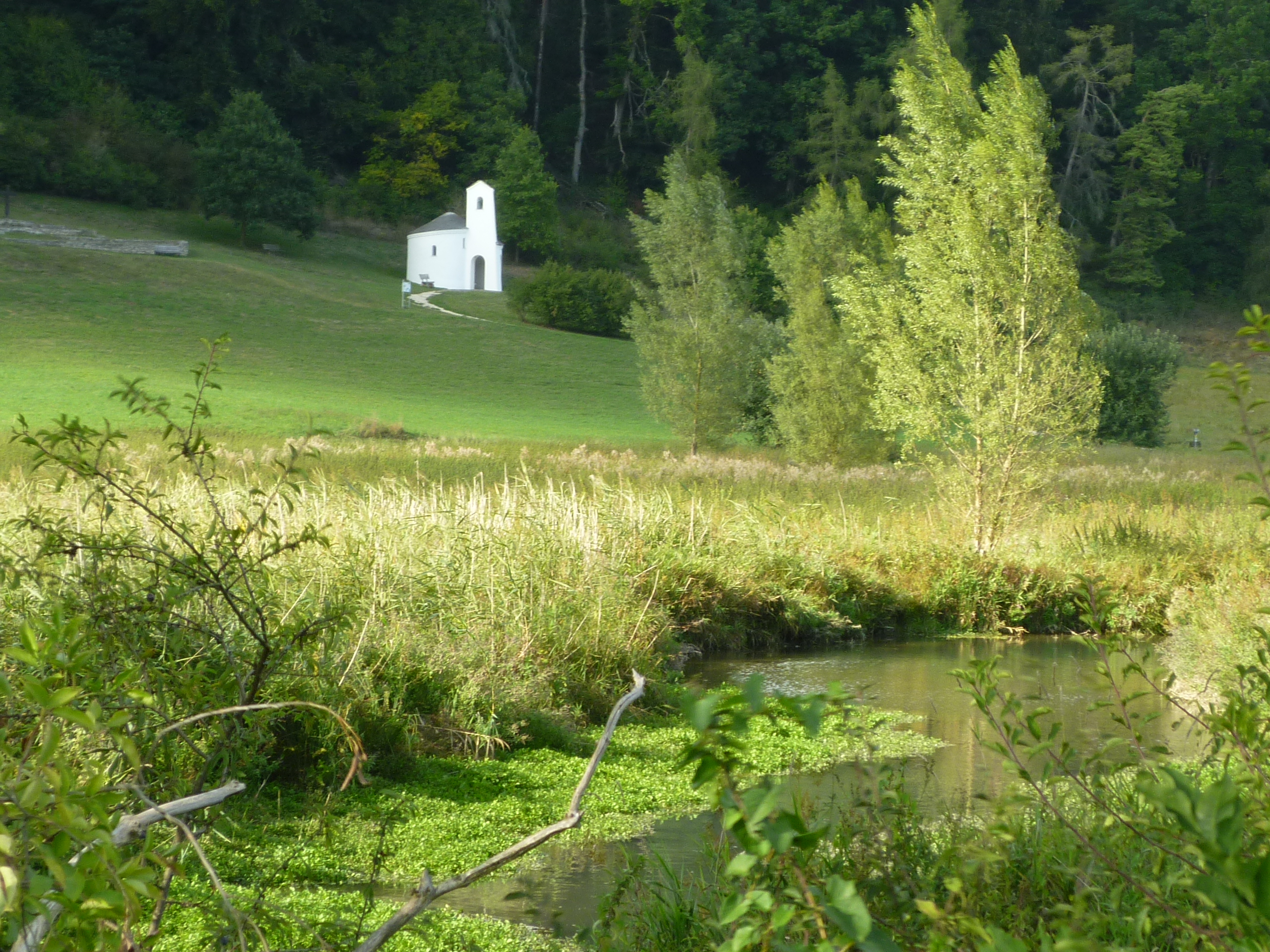 (LSG:BY-LSG-00565.01)_Schutzzone im Naturpark Altmühltal Naturschutzgebiet Schambachried